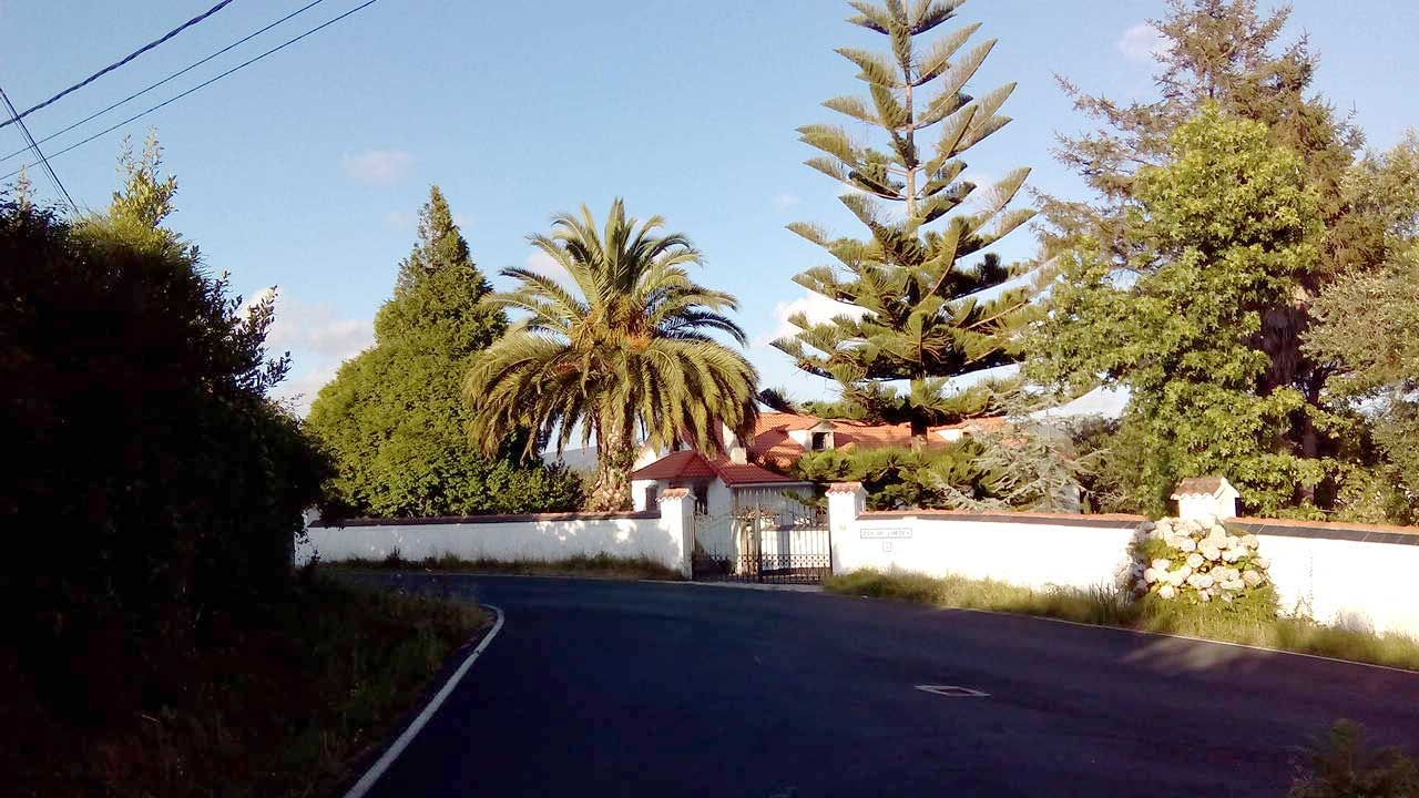 Vista do Río de Cortés, O Val.